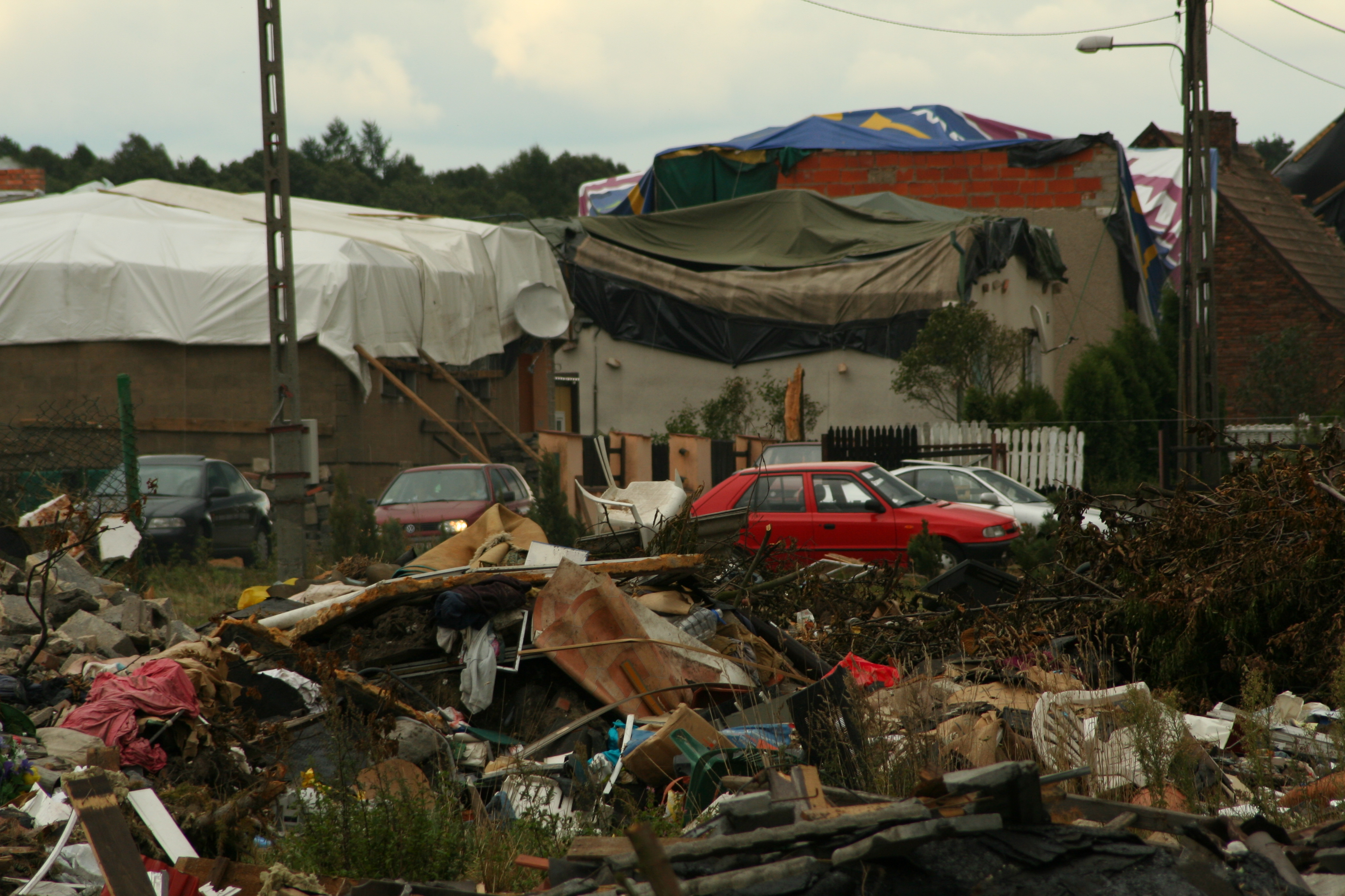 Kalina tydzień po przejściu nad nią tornada, powiat lubliniecki